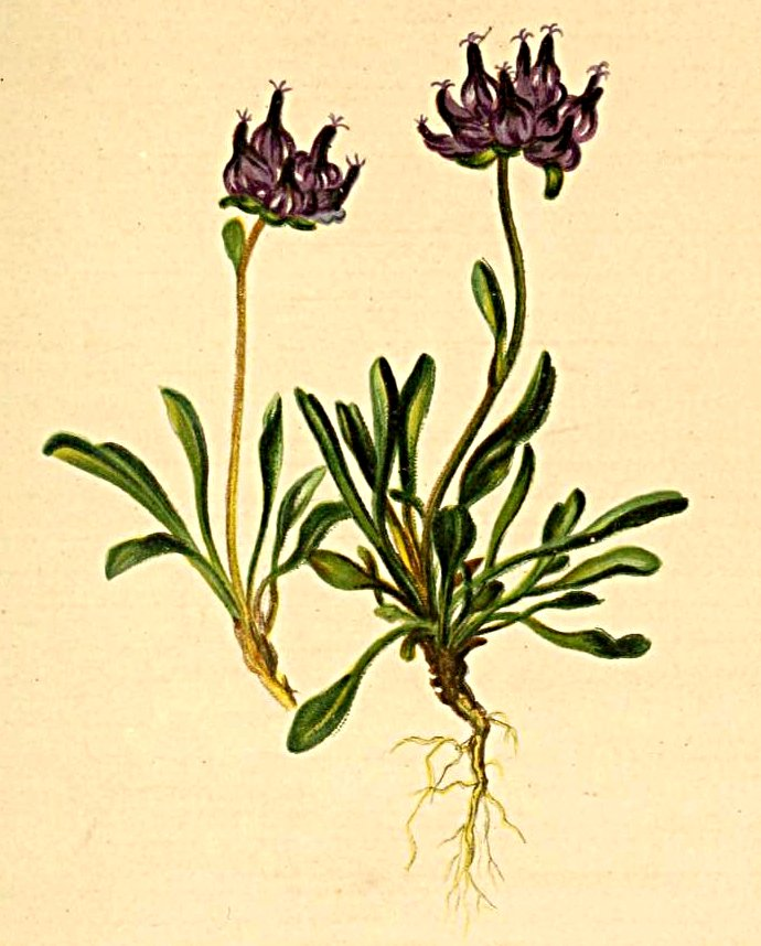 Phyteuma pauciflorum